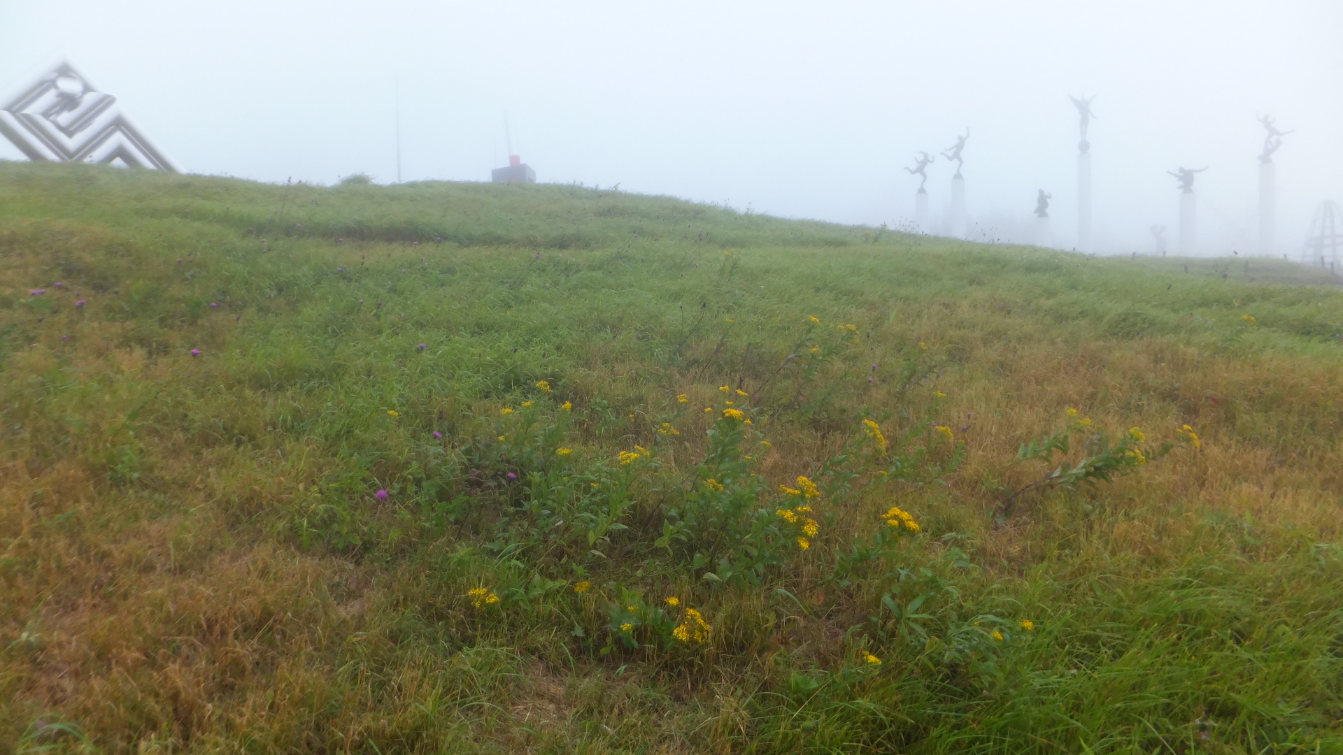 美ヶ原高原美術館（2014年8月15日）